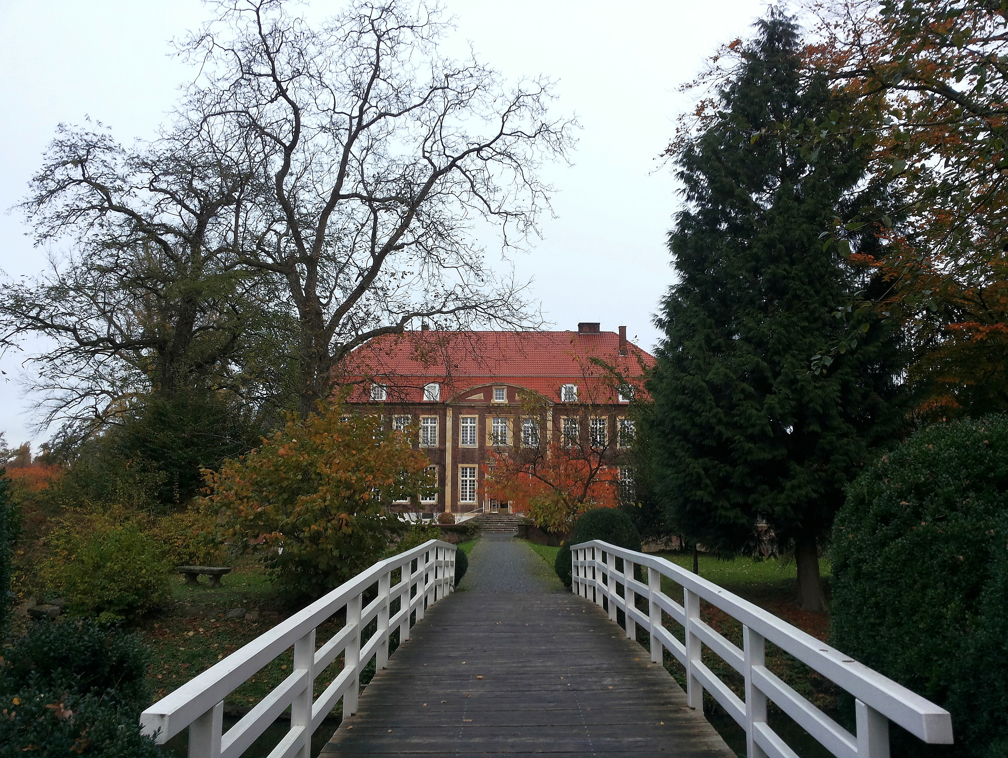 Schloss Wilkinghege, Münster (Germany)